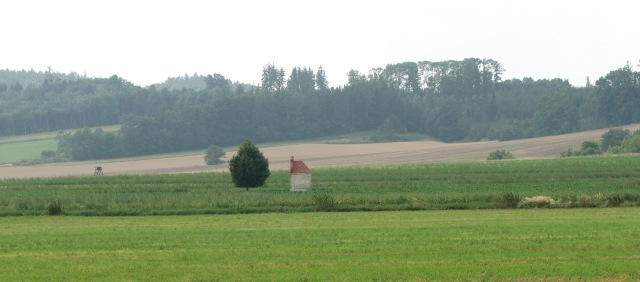 kaplička u Palonína